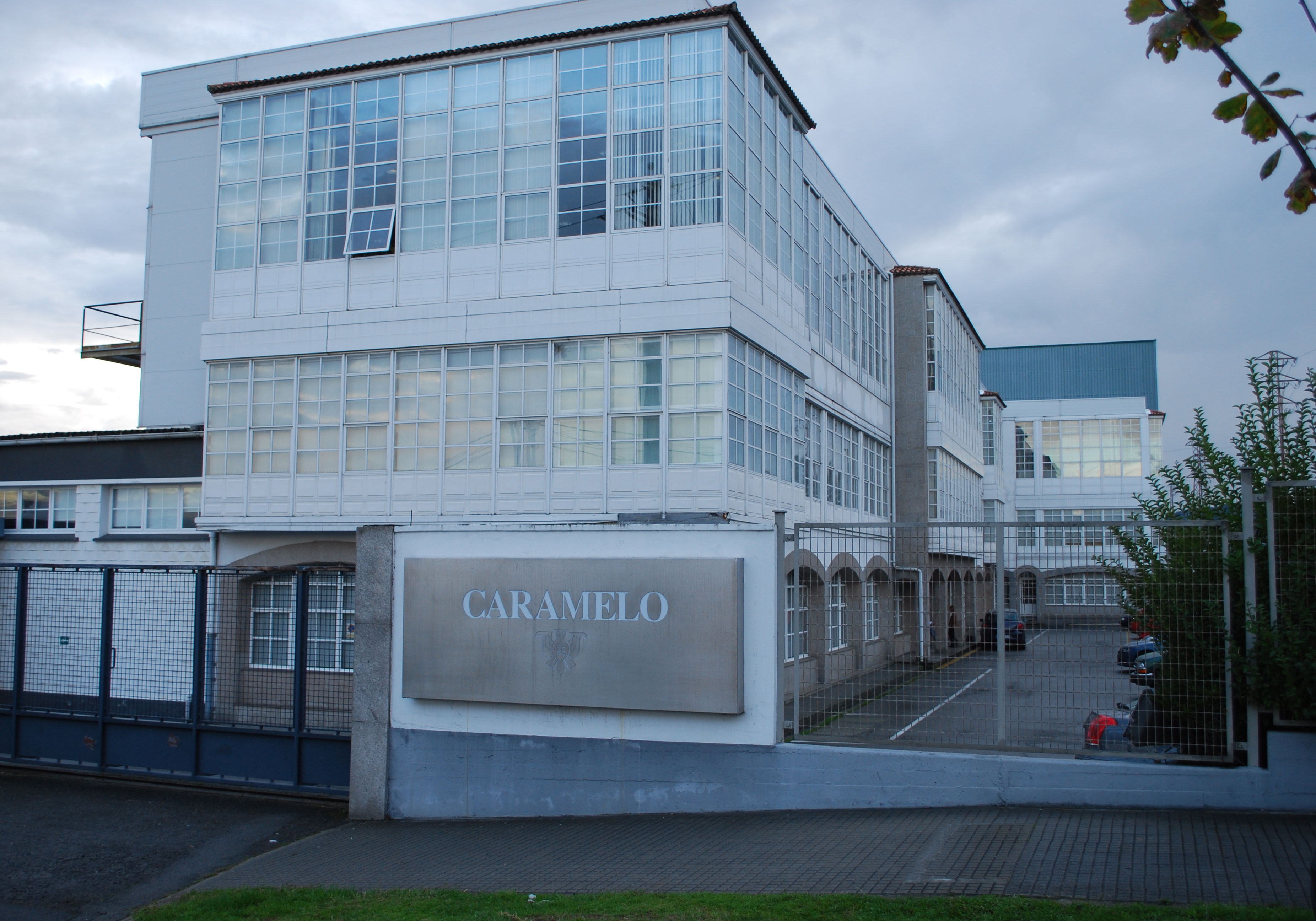 Sede de Caramelo no polígono de Agrela A Coruña, Galiza Spain